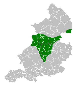 Made by nds-Gebruker:Grönneger 1